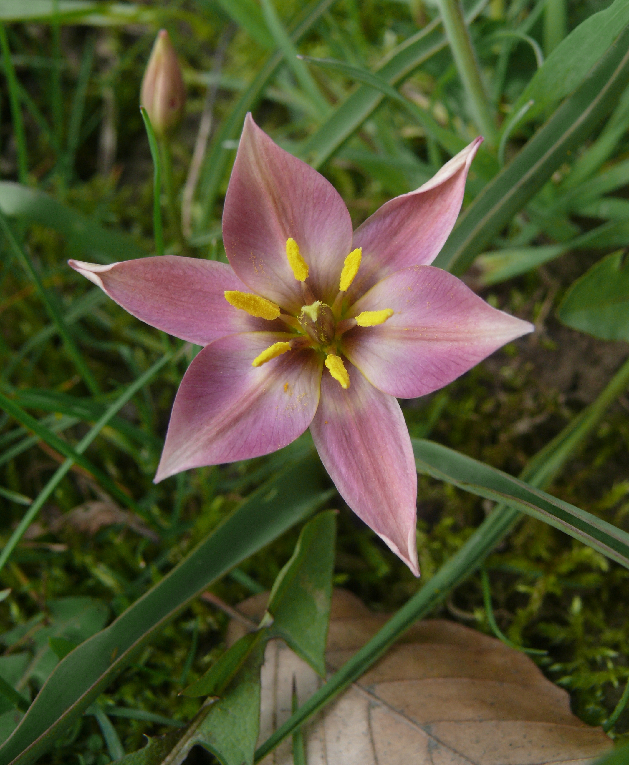 Tulipa aucheriana, garden